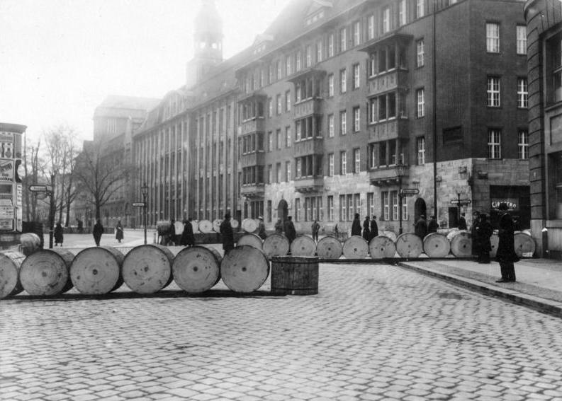 Zu den Berliner Straßenkämpfen No. 27878 Barrikaden am Kölnischen Park (nahe dem Marinehaus)